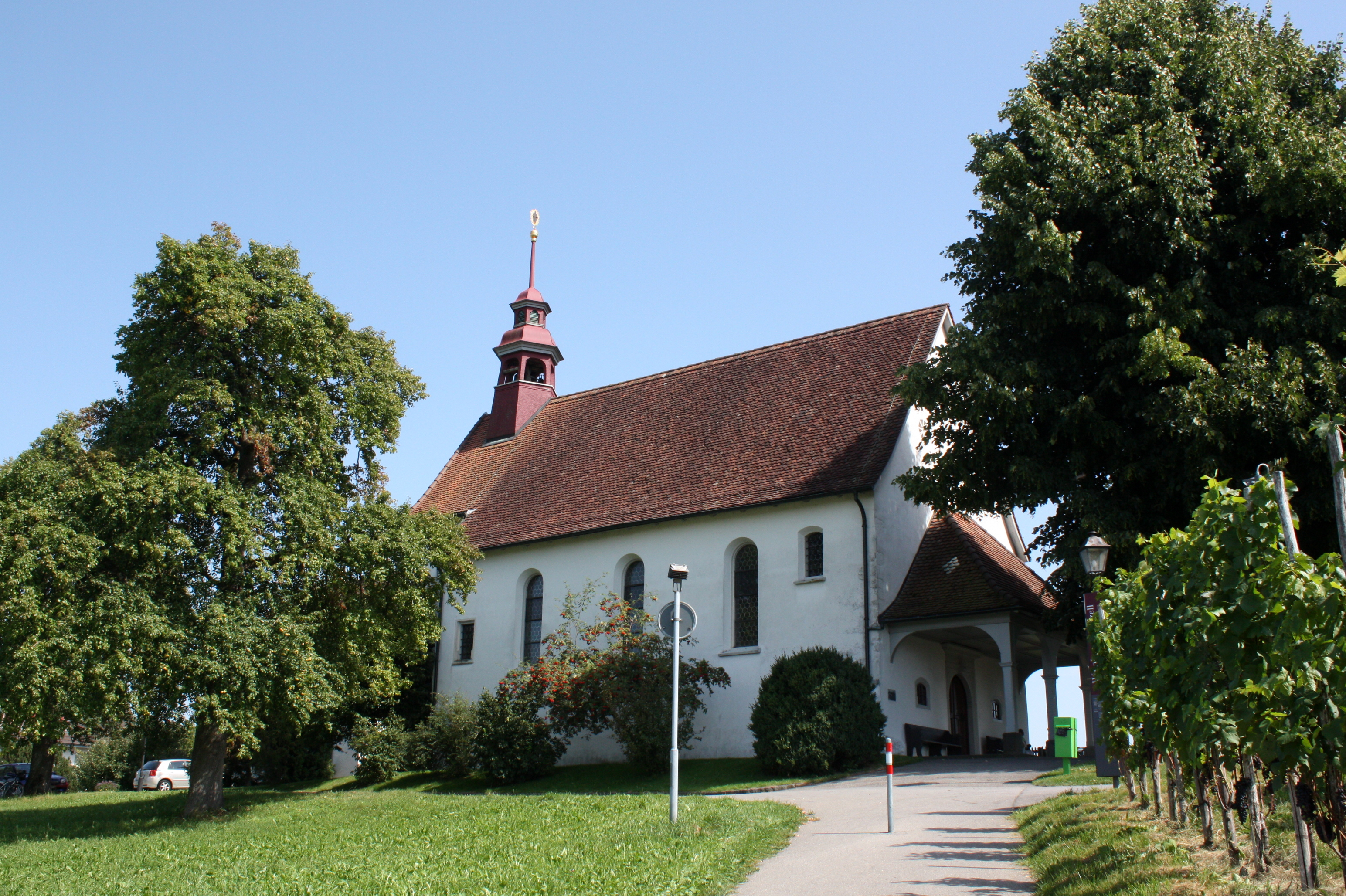 Wallfahrtskirche Mariazell (Nordwest)